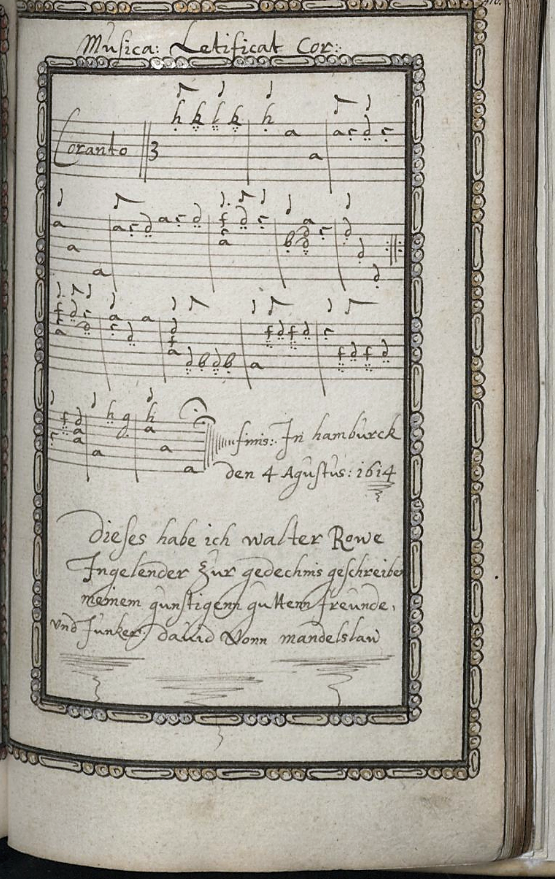 Autograph of Walter Rowe (1584 - 1671) in the Album amicorum of David von Mandelsloh 1614; this is belived to be "The first piece for lyra-viol to have been copied on the continent is a courante in ffhfh tuning by the English violist and composer Walter Rowe, written out in August 1614 in Hamburg, shortly before he was appointed as violist in the Elector of Brandenburg's chapel" [1]